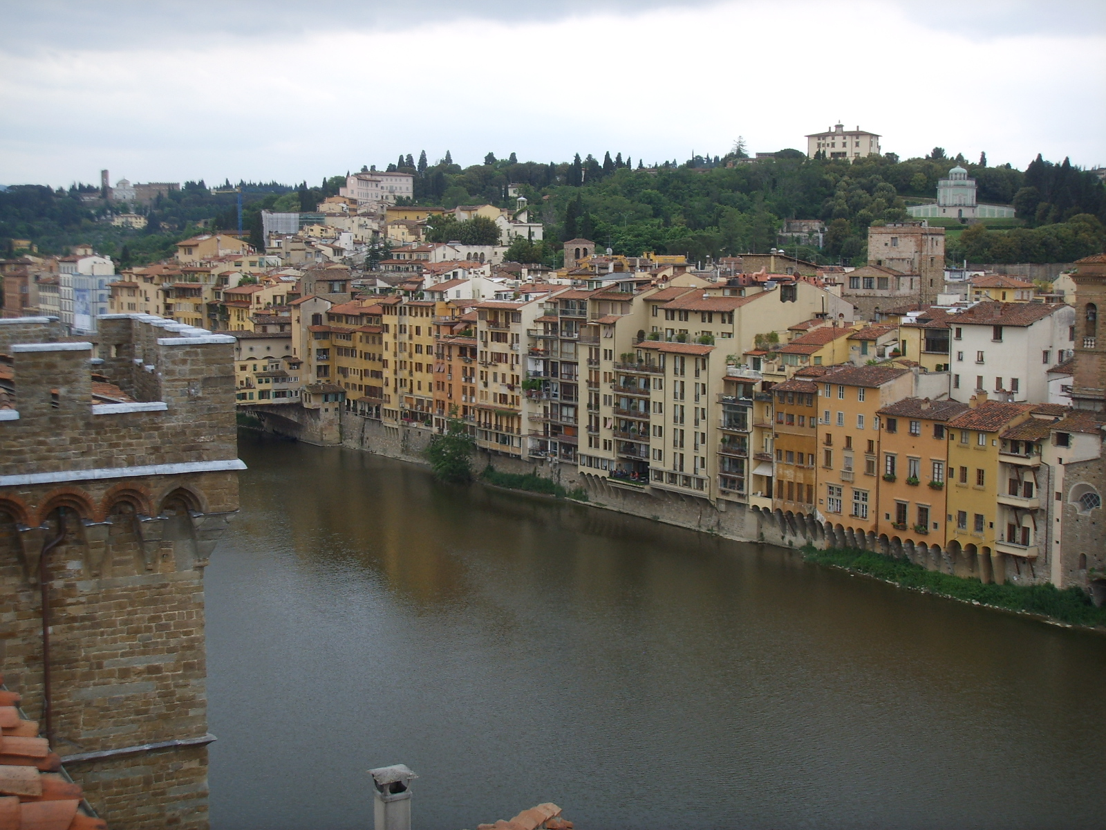 Torre dei gianfigliazzi, veduta, borgo san jacopo, forte belvedere e kaffeehaus